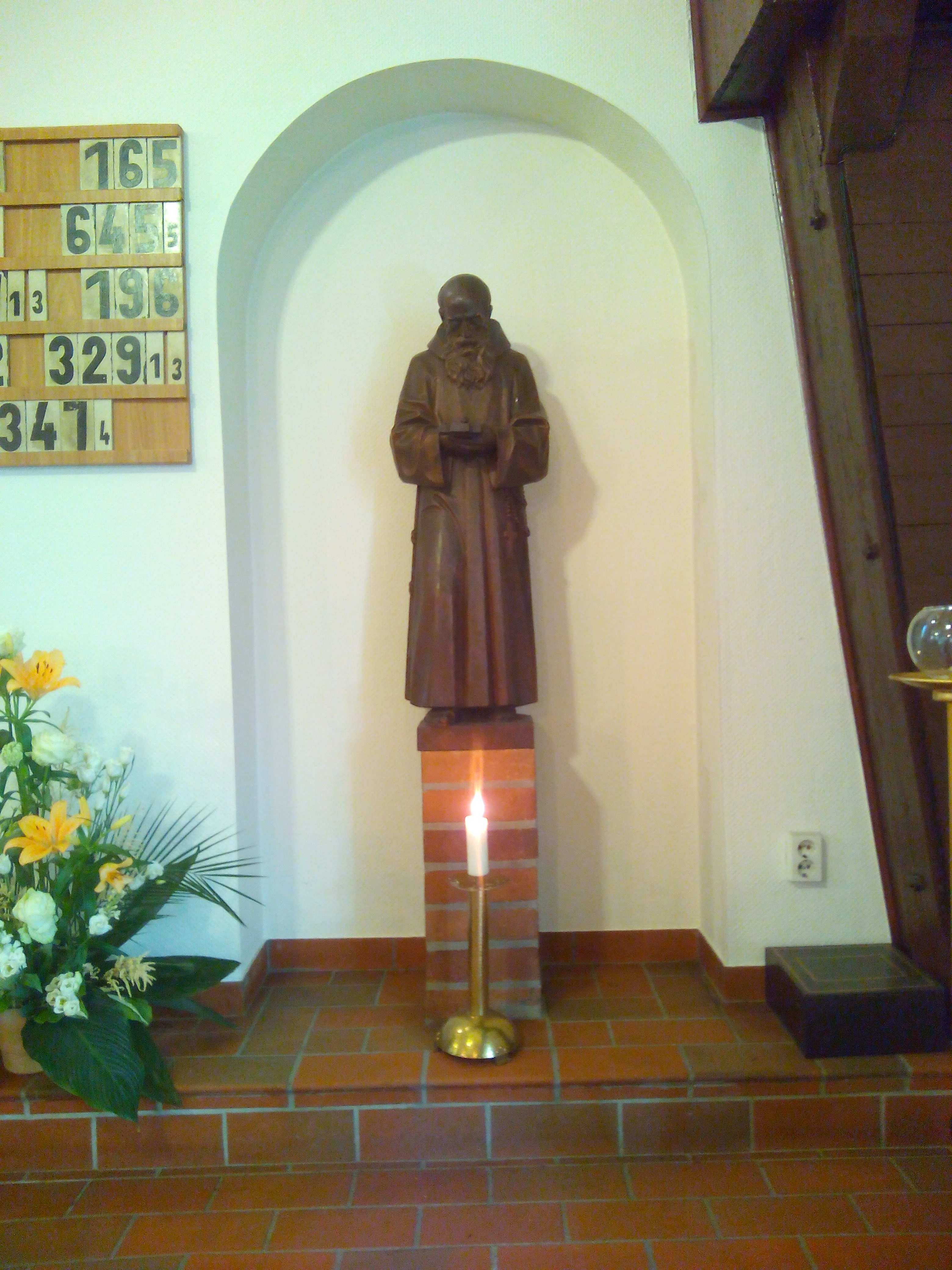 Die Statue des Hl. Konrad von Parzham in der Kirche St. Konrad in Falkensee